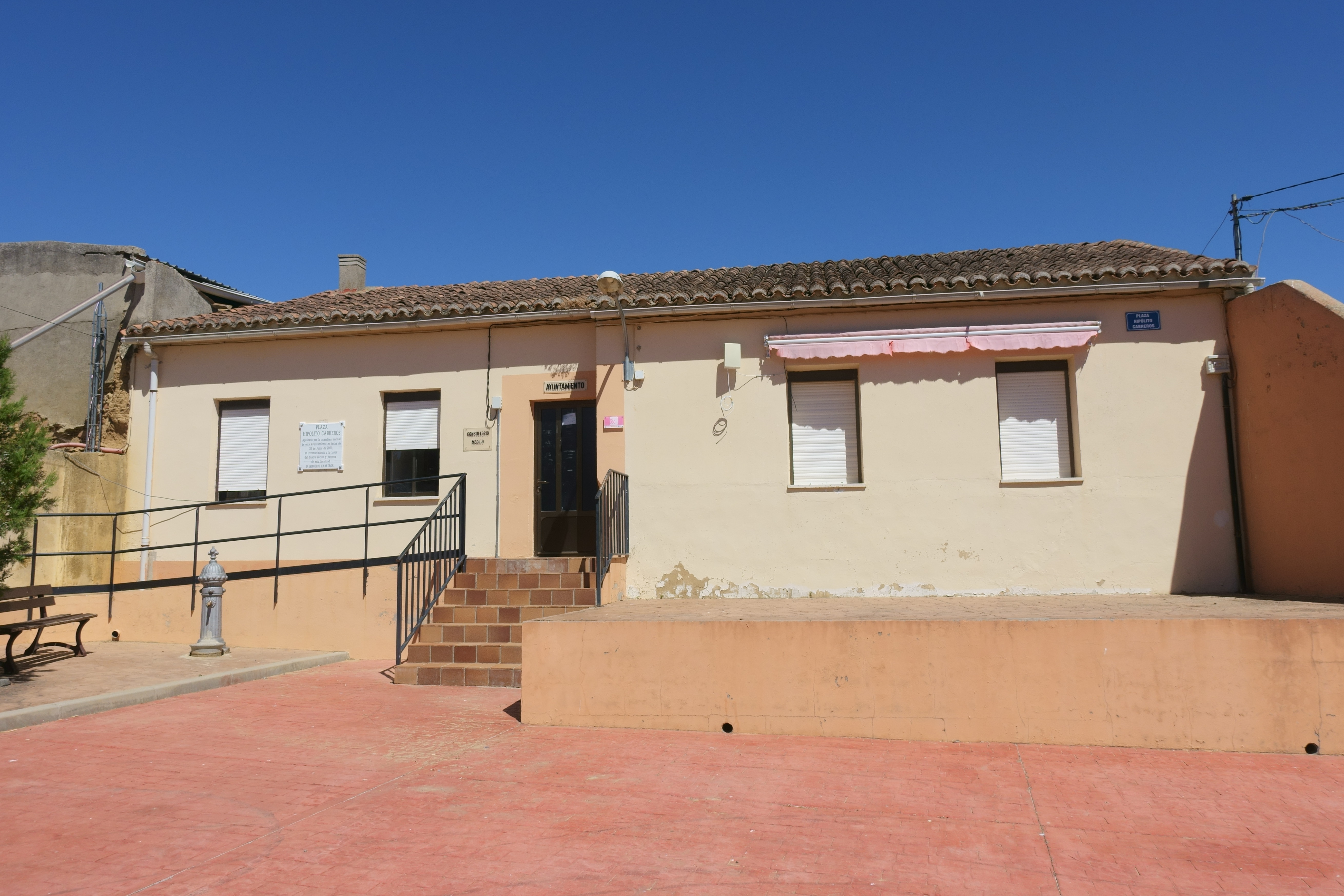 Casa consistorial de Villanueva de la Condesa (Valladolid, España).